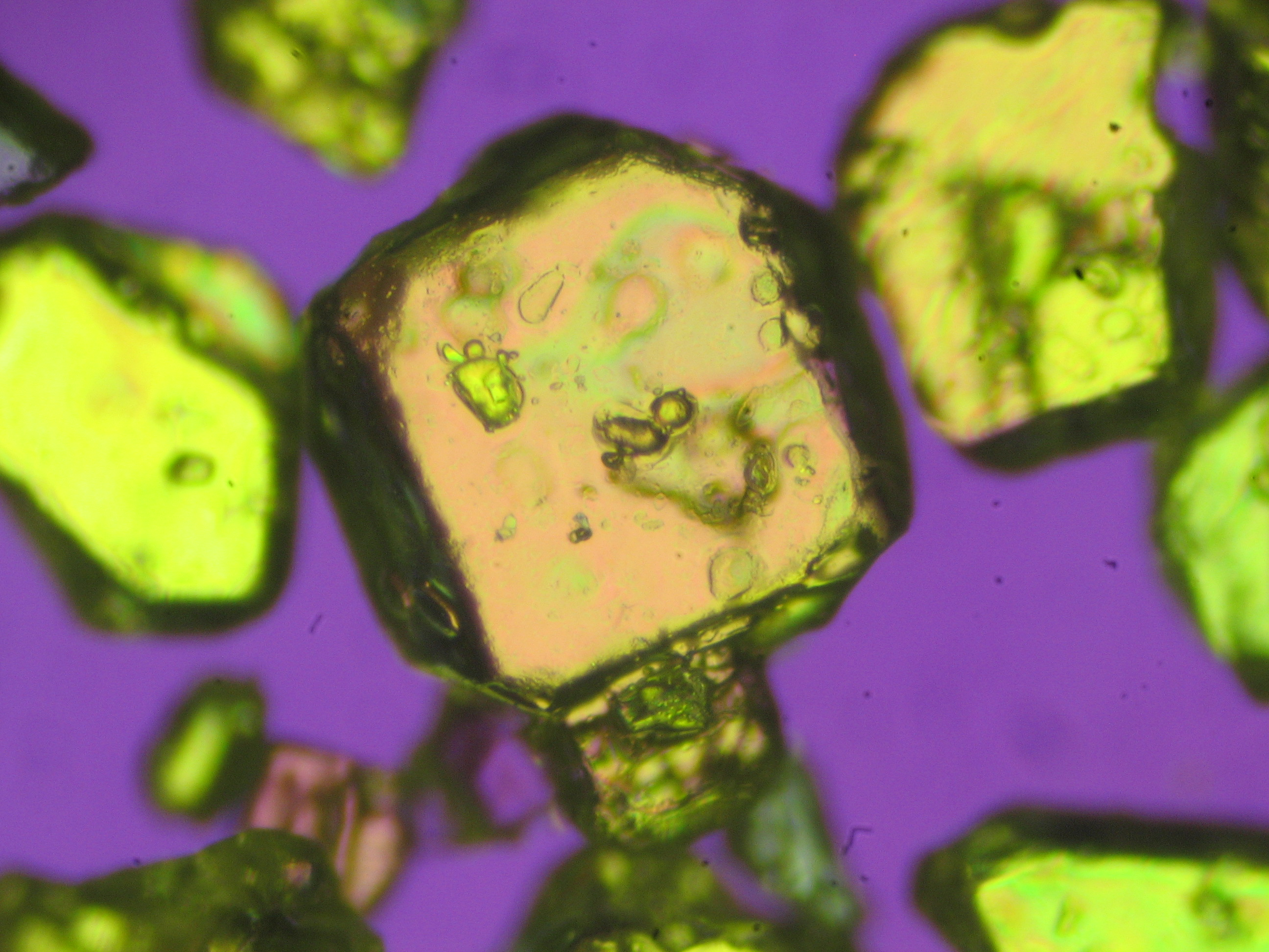 cristaux de nitrate d'argent vus au microscope avec lumière polarisante